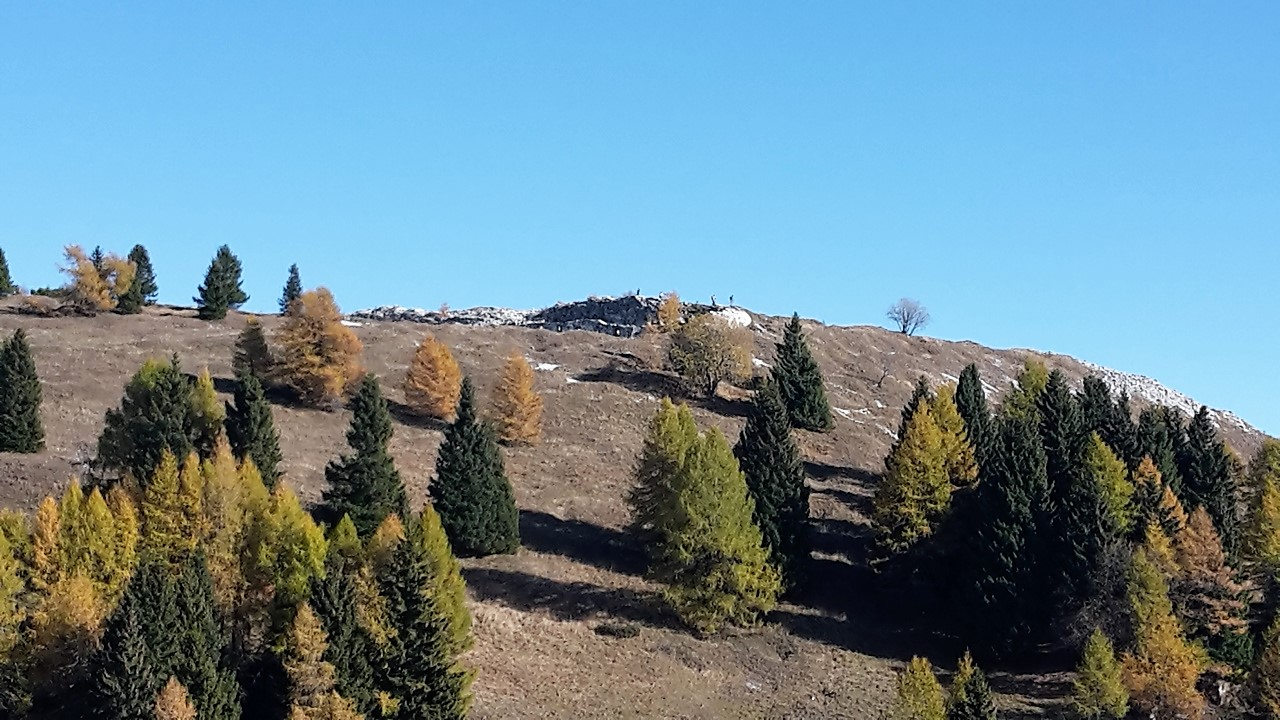 Forte Dosso delle Somme